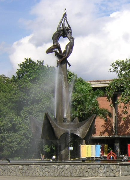 El Hombre Creador obra de Rodrigo Arenas Betancur, Universidad de Antioquia. Medelln.Colombia